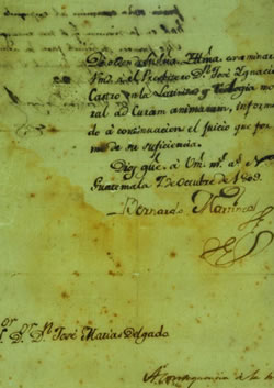 Documento del siglo XIX firmado por José Matías Delgado.